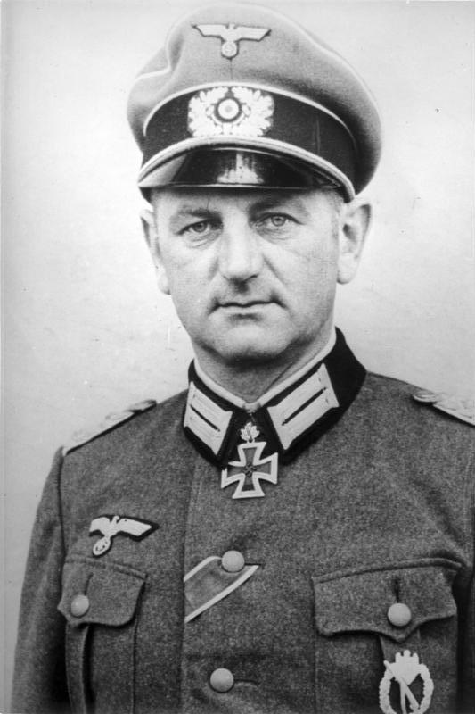 Oberst Hitzfeld, Kdr. I.R. 213, bekam als 65. Offizier das Eichenlaub zum Ritterkreuz des Eisernen Kreuzes. herausg. 25.2.42 PK-Aufnahme:Kriegsberichter Hackl